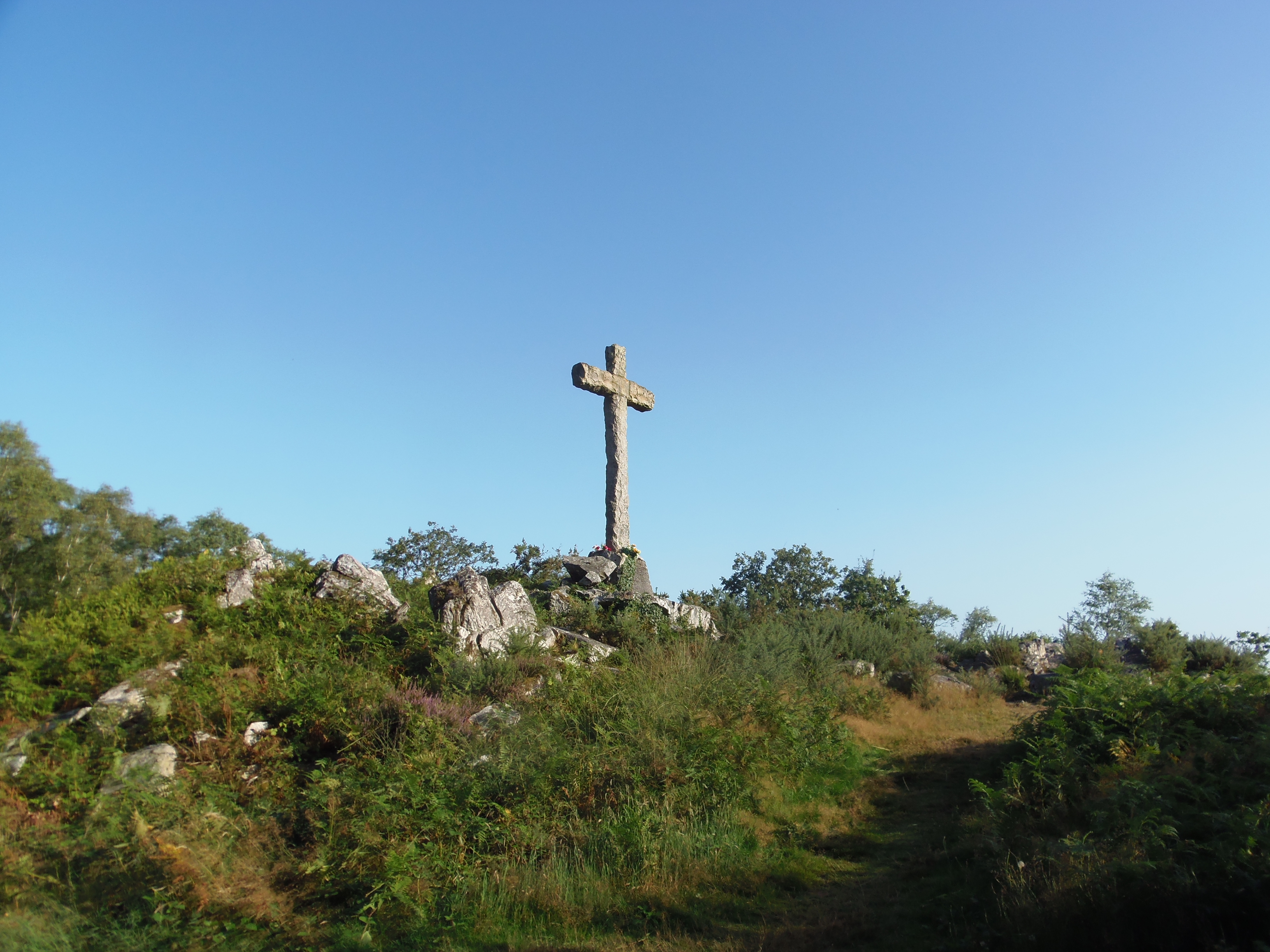 Saint-Georges-de-Rouelley (Normandie, France). Le calvaire du Roc.